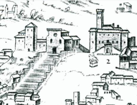 Campidoglio